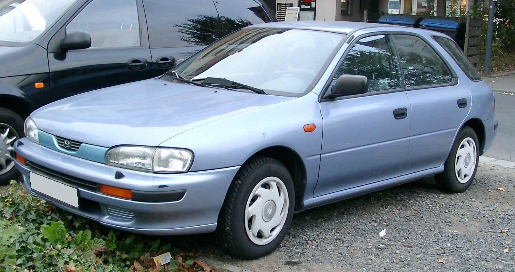 Subaru Impreza Wagon